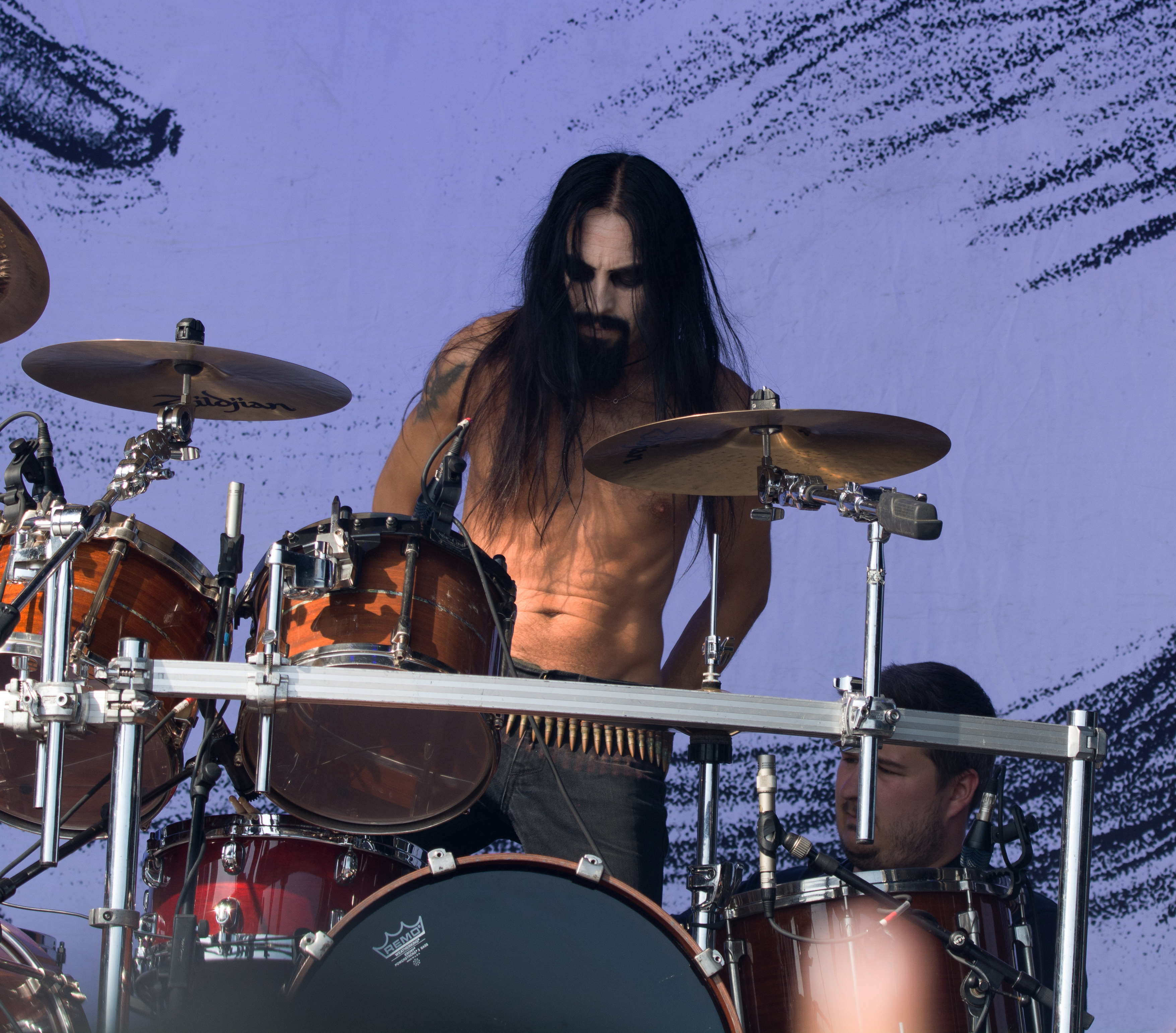 Satyricon beim Elbriot 2018